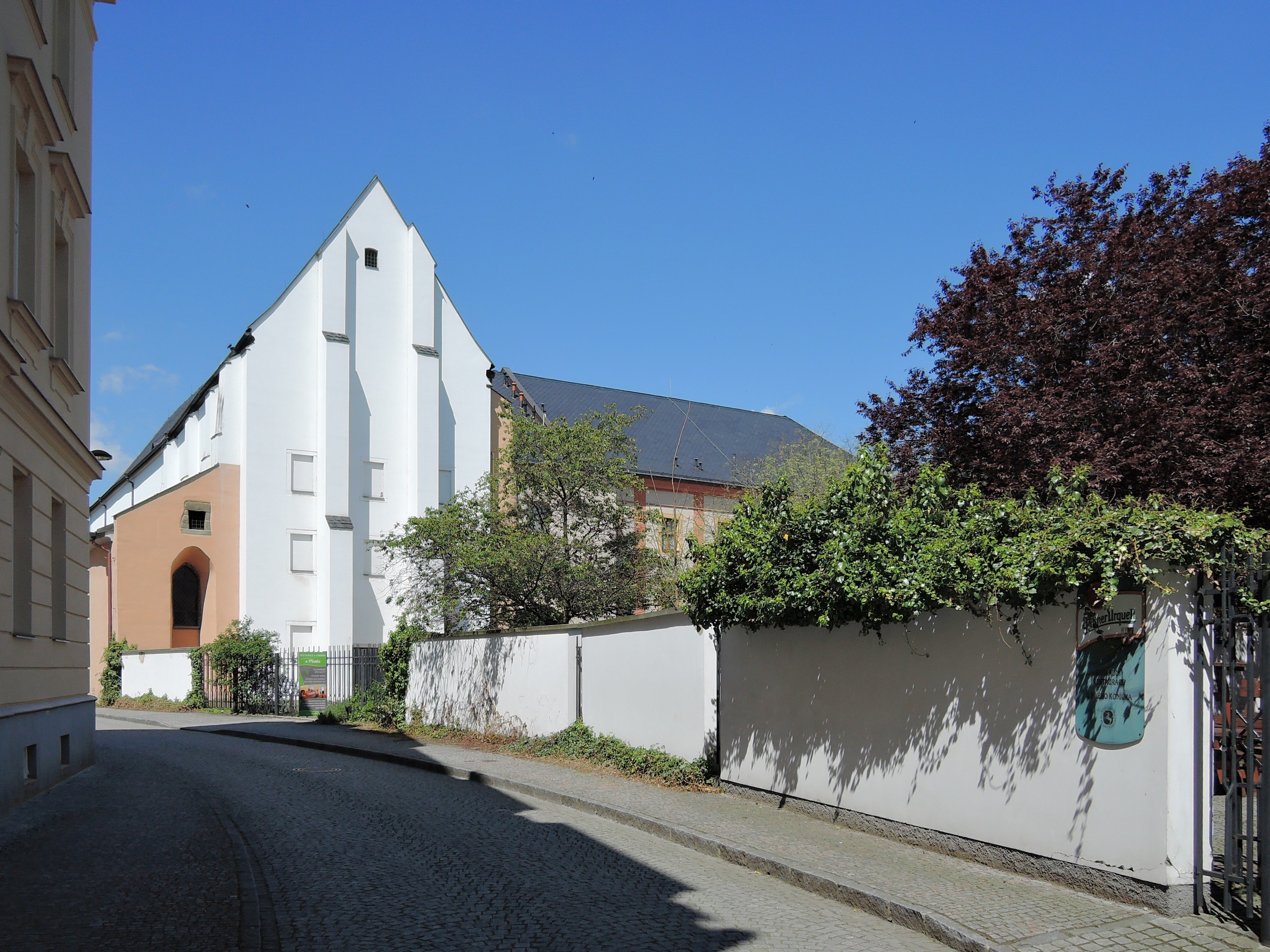 Opava, ulice Mnišská, bývalý dominikánský klášter s kostelem sv. Václava